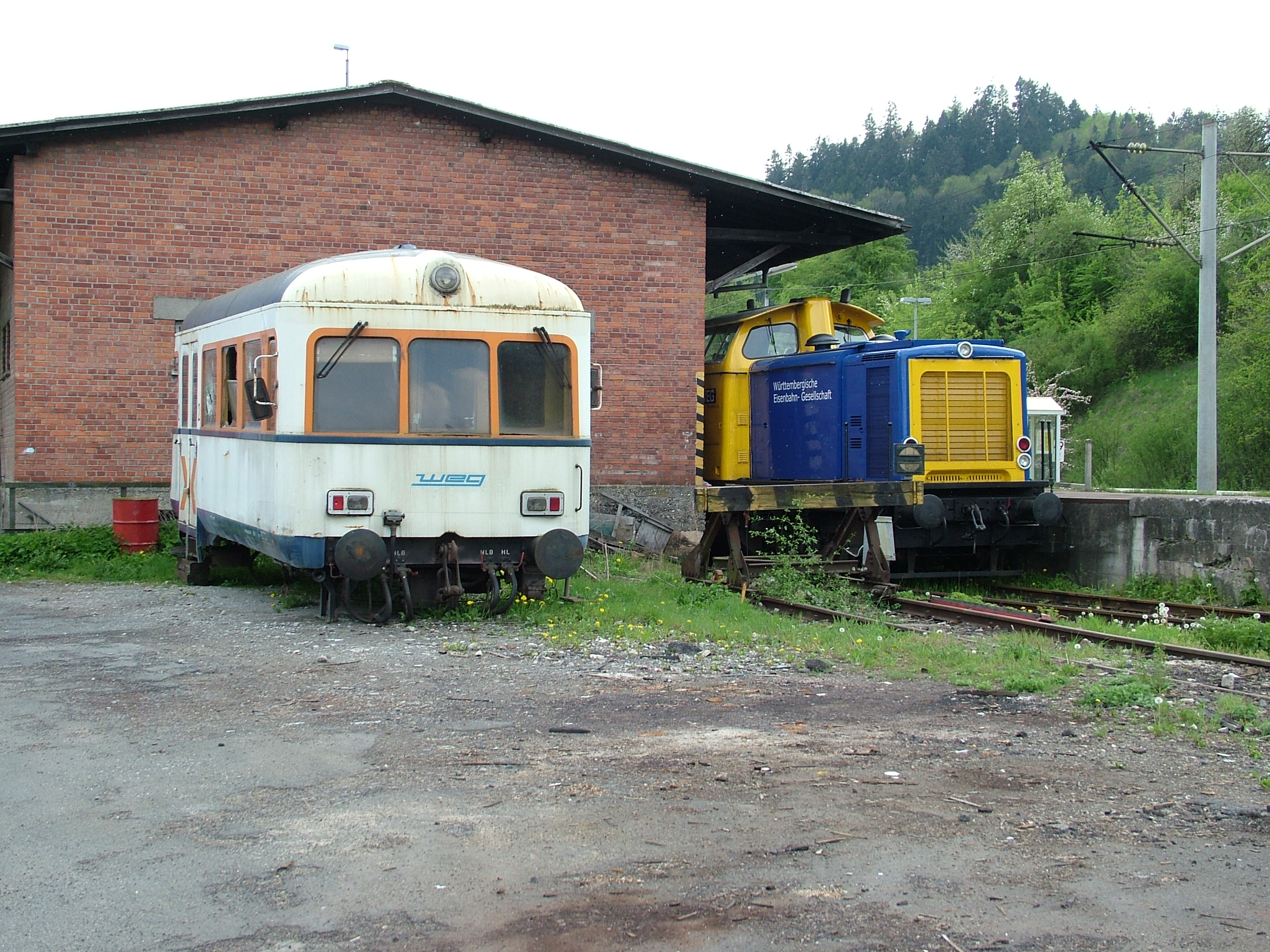 Rechts WEG V125, links der Rest des verunglückten Esslinger VT (ex SWEG VT 114)